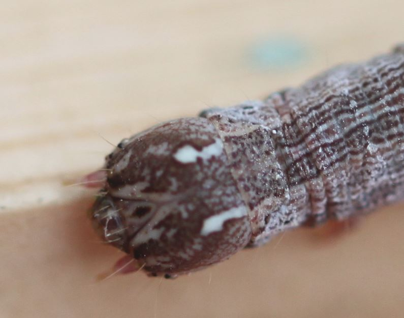 Raupe Dysgonia algira, gefunden an einem Brombeerstrauch am 6. September 2019 in der Schwetzinger Hardt